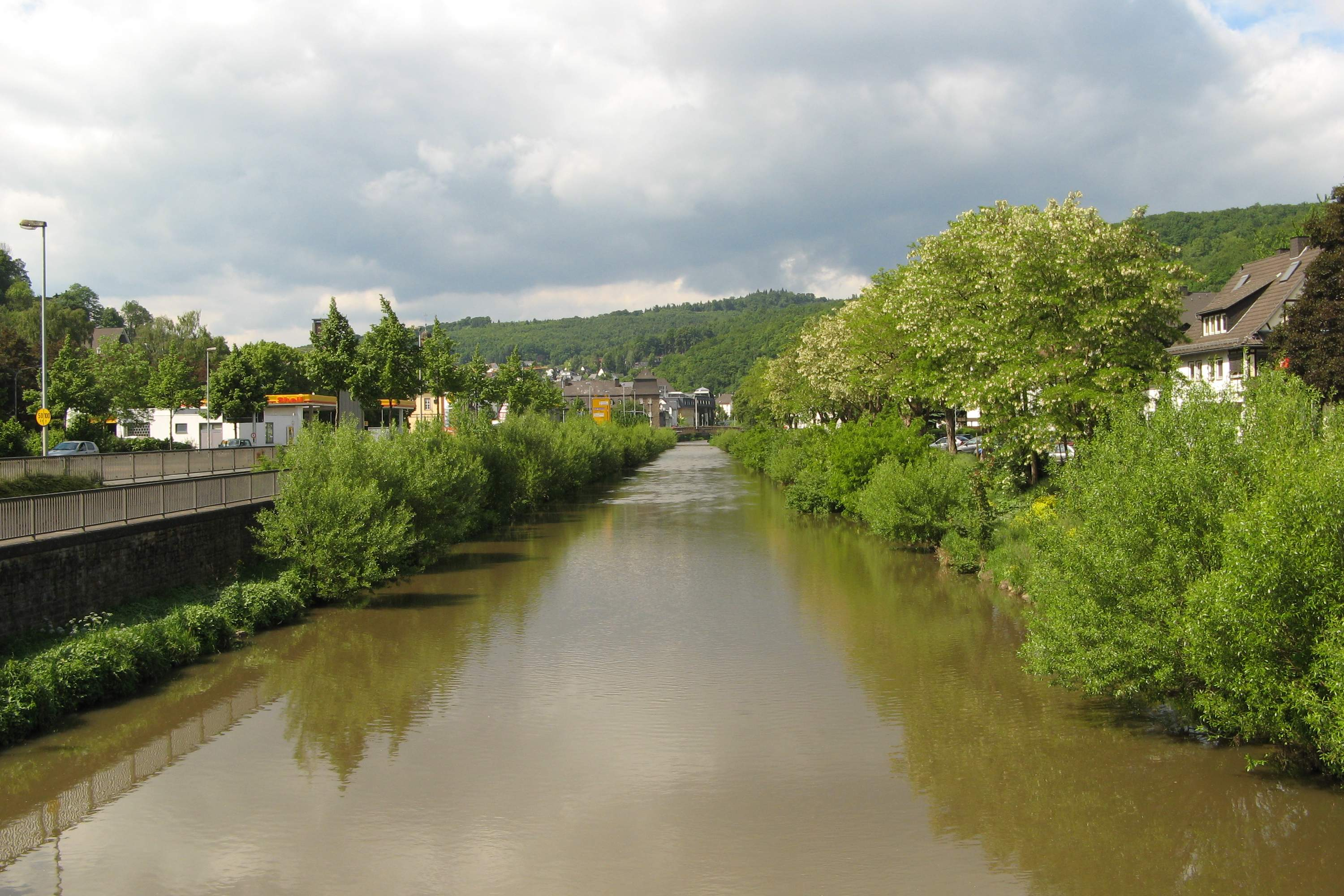 Dill in Dillenburg, Blickrichtung Untertor